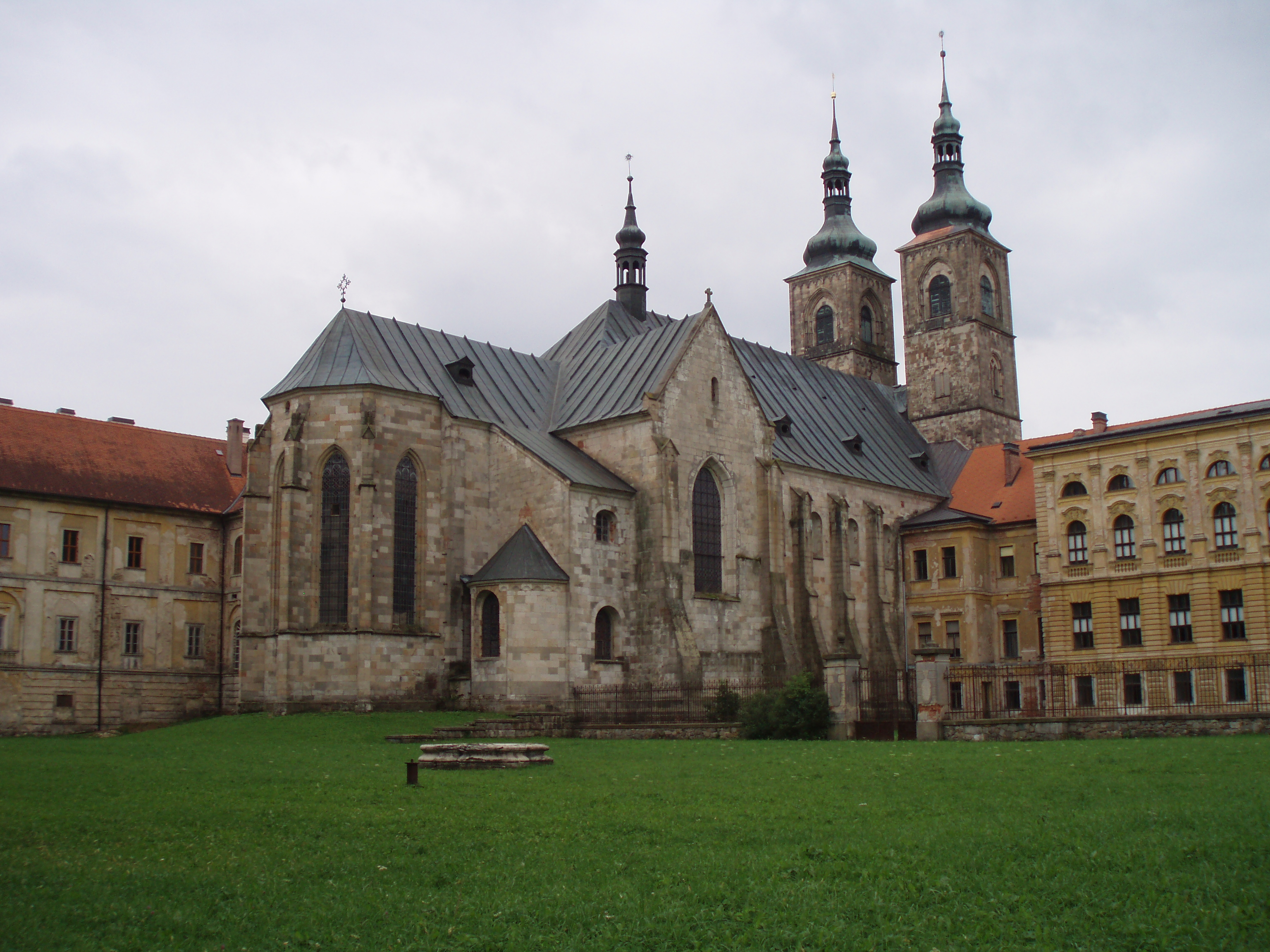 Premonstrátský klášter Teplá, Klášter 7, Klášter (Teplá).